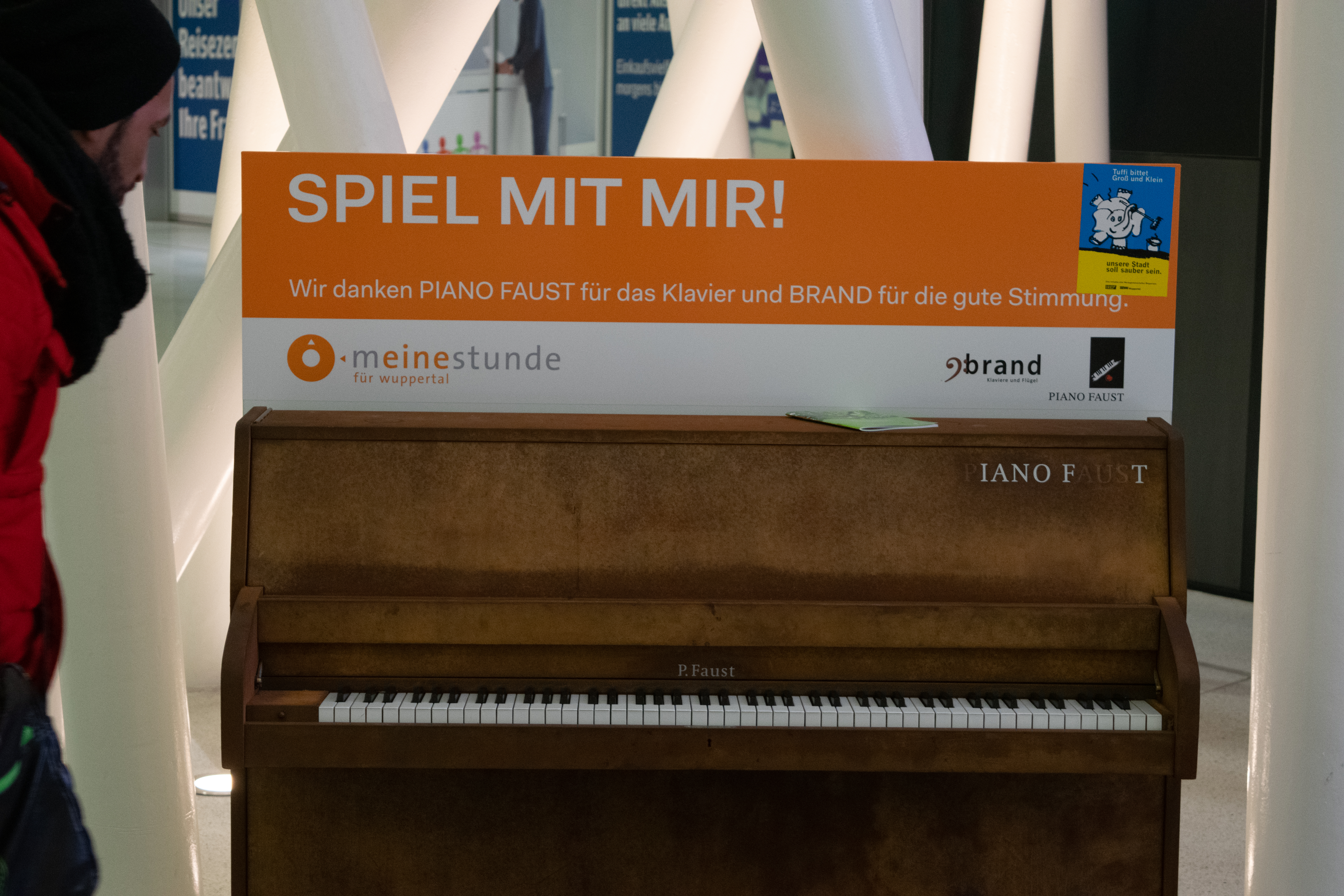 Döppersberg, Wuppertal